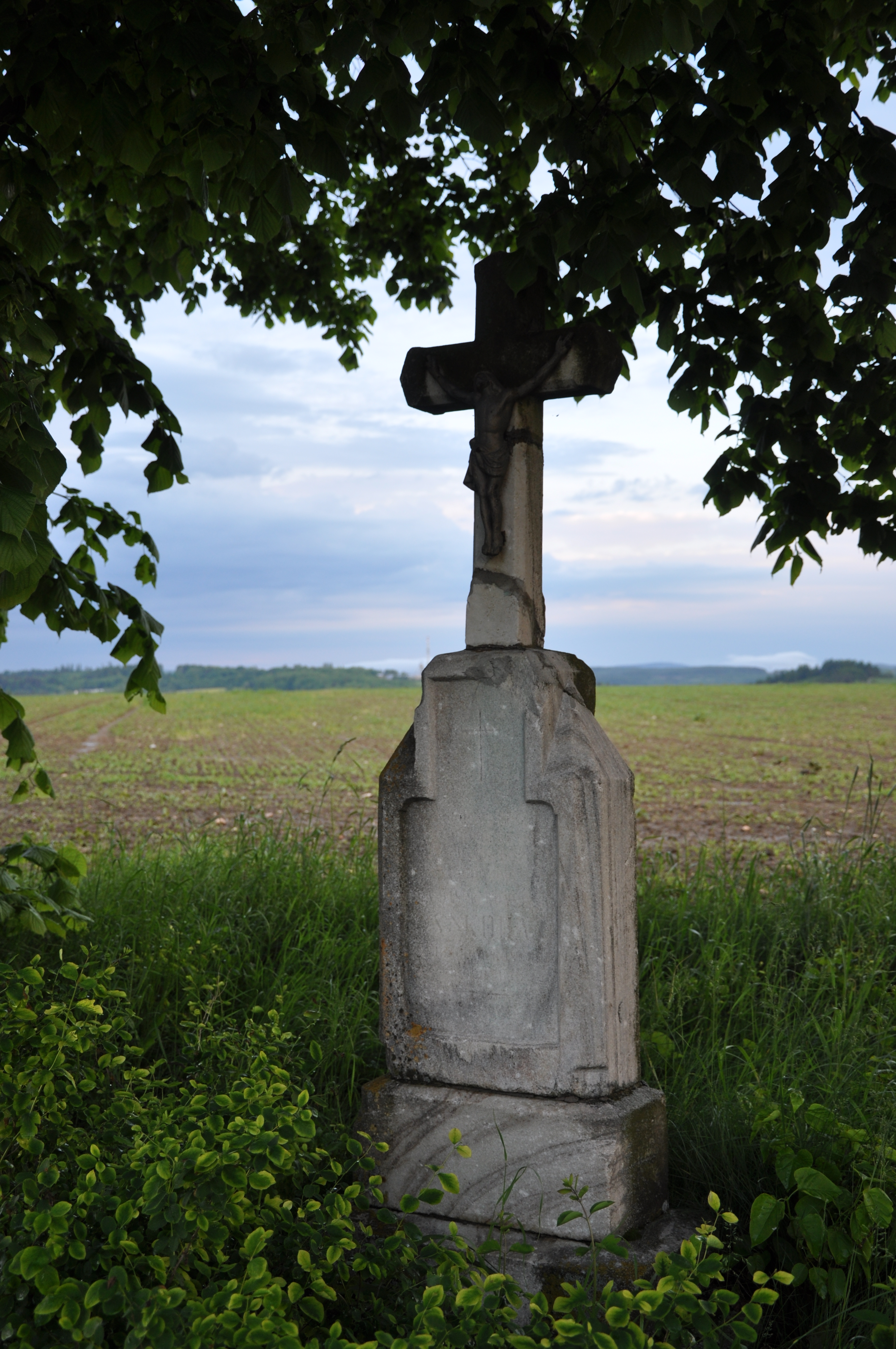 Horní Rozsíčka - kříž u křižovatky na silnici Horní Rozsíčka - Dolní Rozsíčka